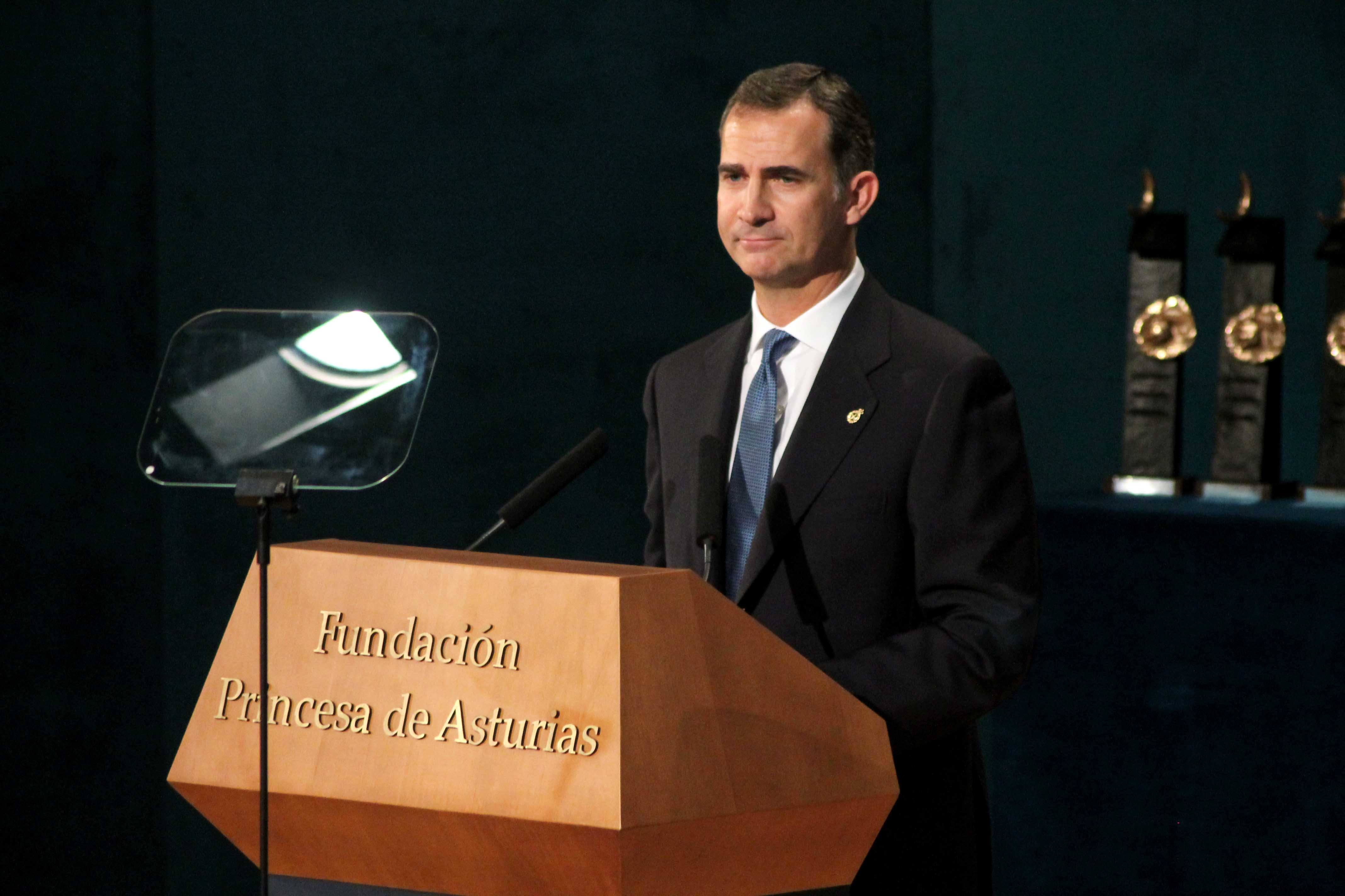 Premios Princesa de Asturias 2015